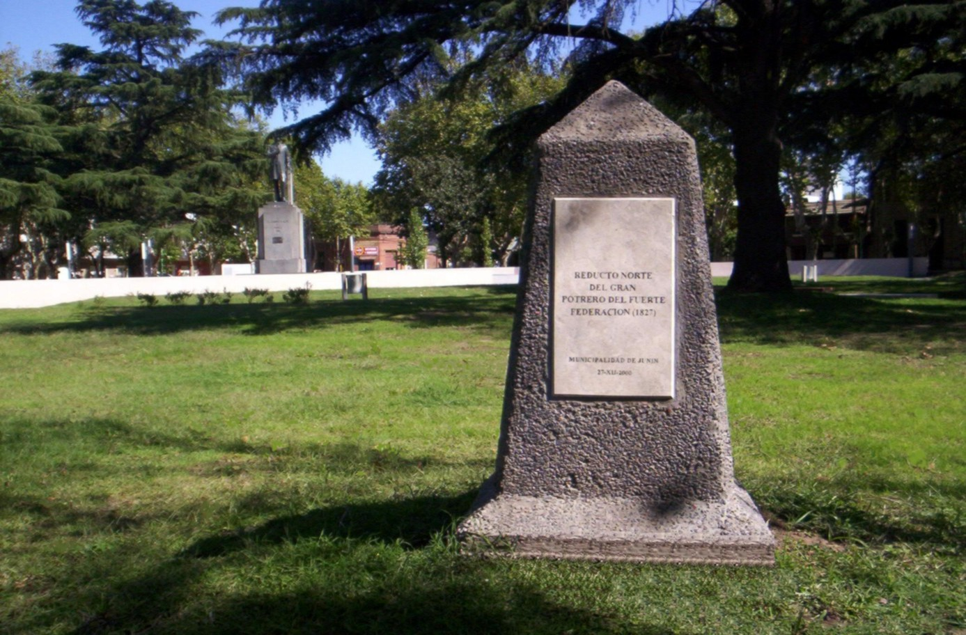 Hito histórico marcando el extremo norte del Fuerte Federación, en la Plaza Leandro N. Alem, Junín, Argentina.